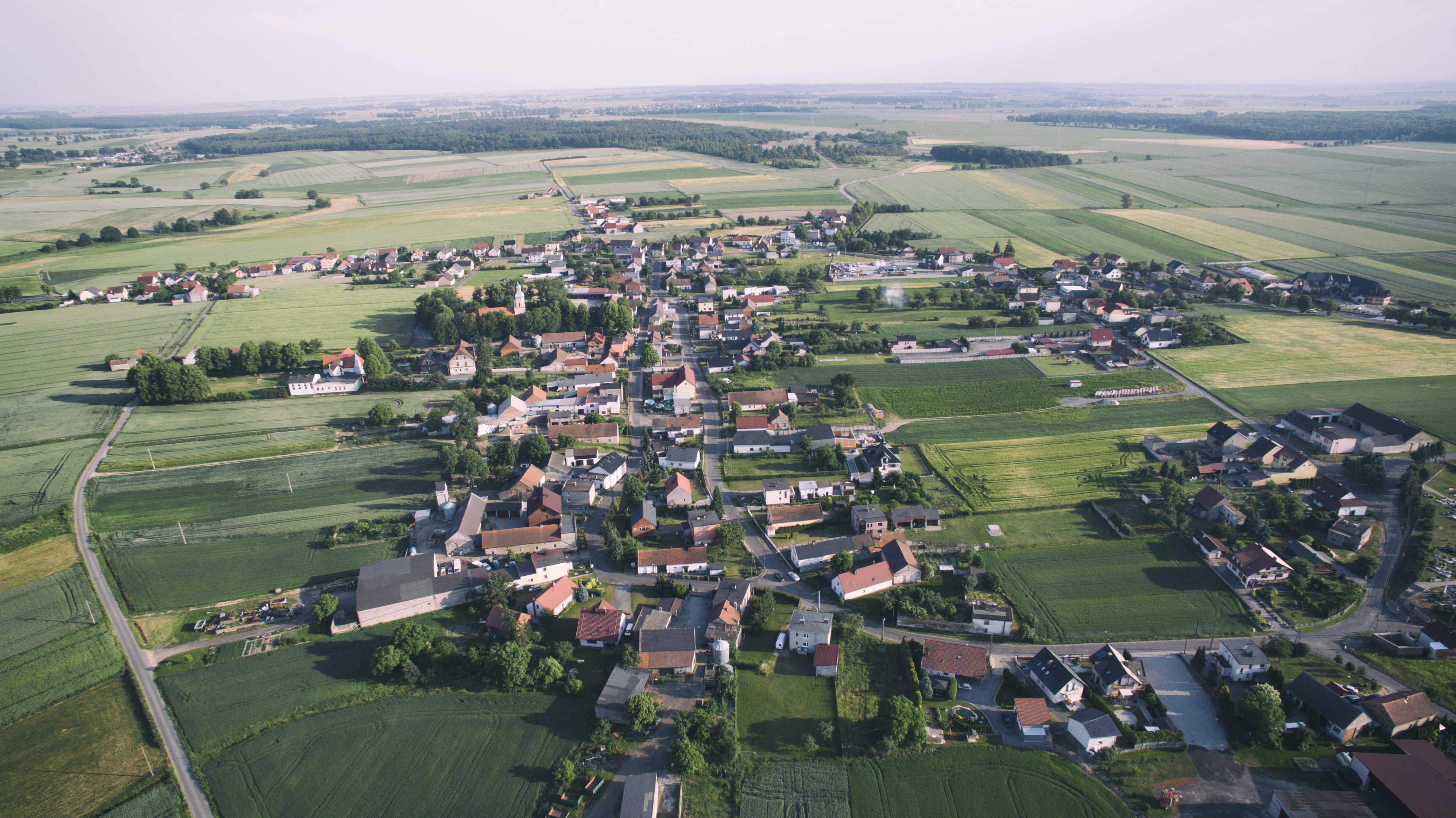 Zdjęcie z drona wsi Pokrzywnica